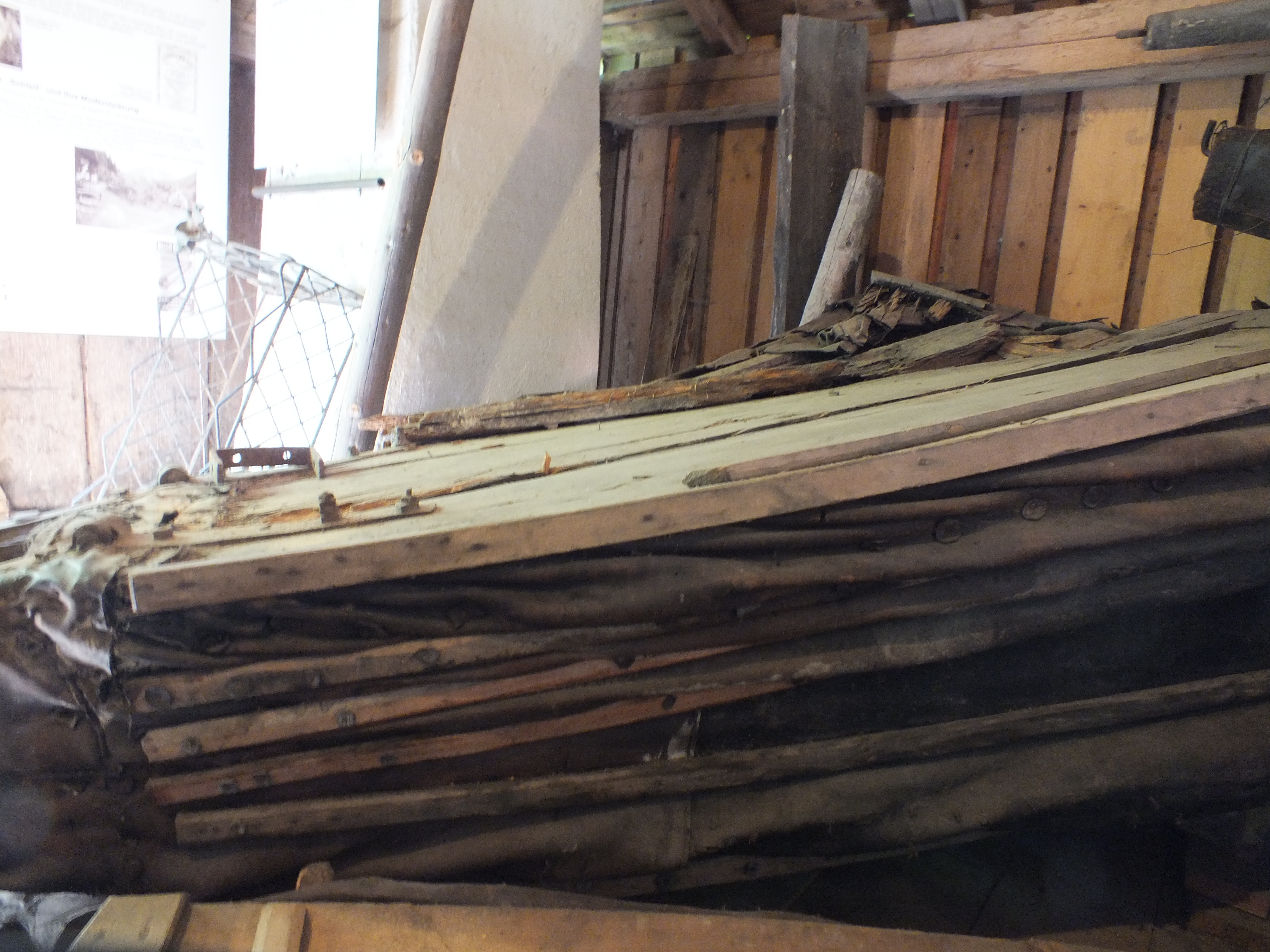 Glockenschmiede und Museum Ruhpolding: Teil des histor. Blasebalgs auf dem Hammerboden